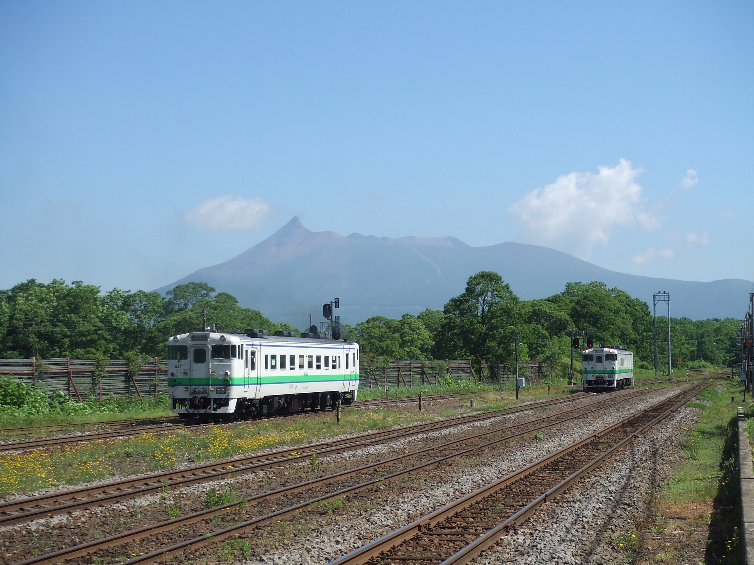 大沼駅 駅からの剣ヶ峯を望む